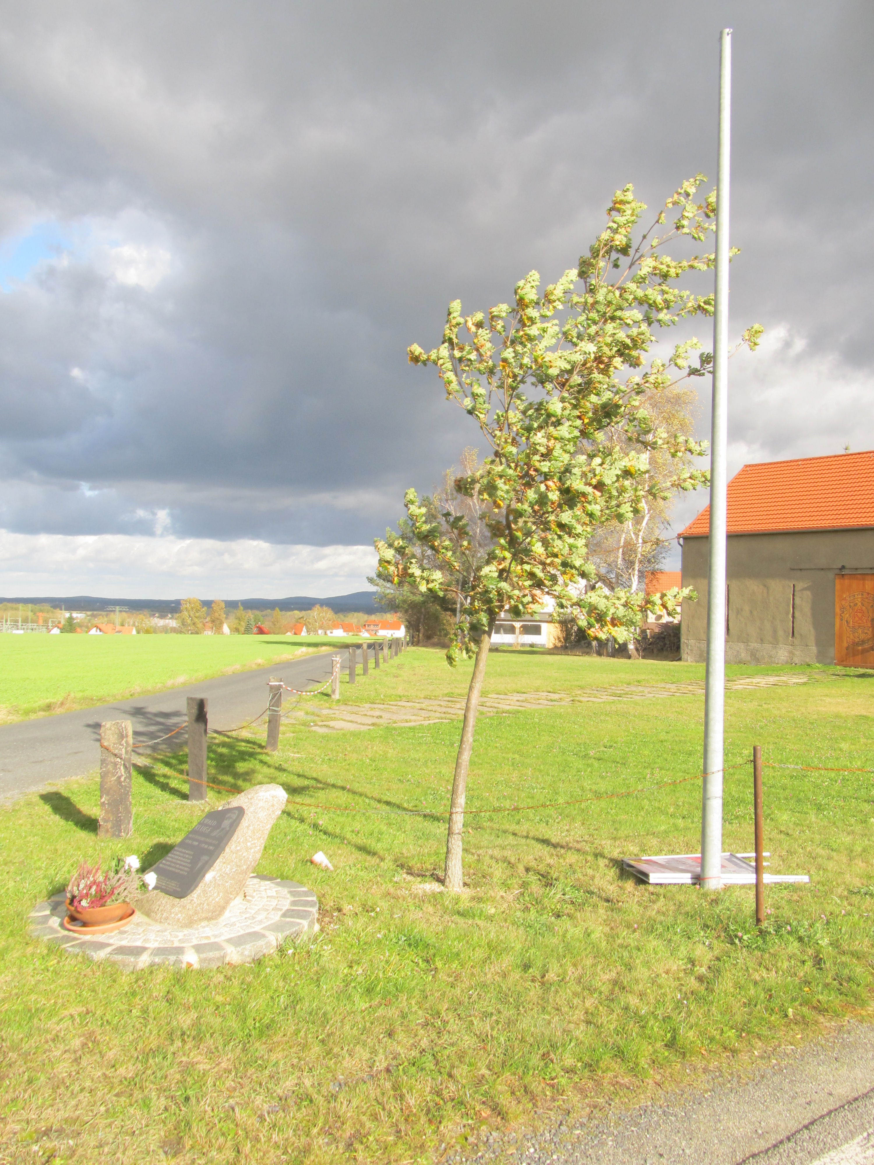 Ewald-Kluge-Eiche während des Sturmtiefs Herwart